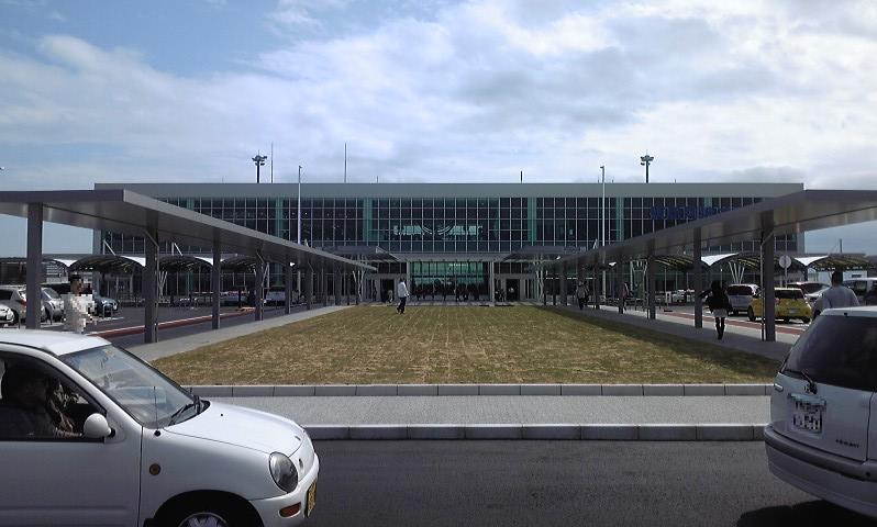 徳島阿波おどり空港。